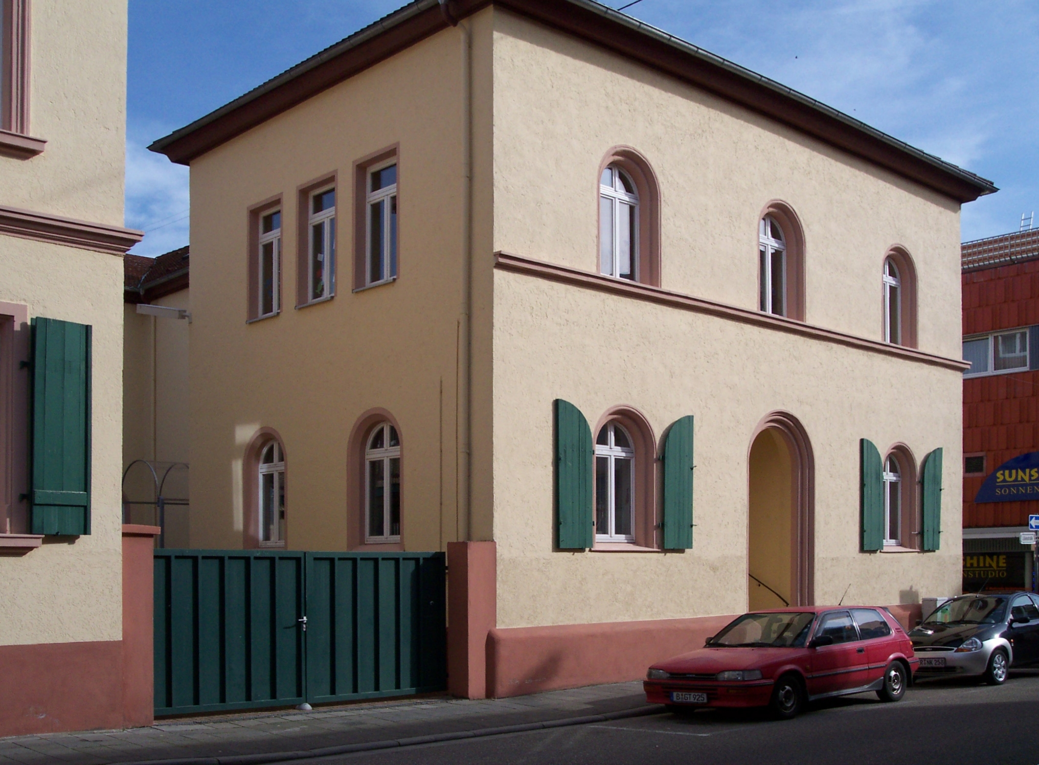 Ehemaliges Gebäude des Progymnasiums, heute Tagewerk der Jugendhilfe. So? Luxo. Auch entzerrt.